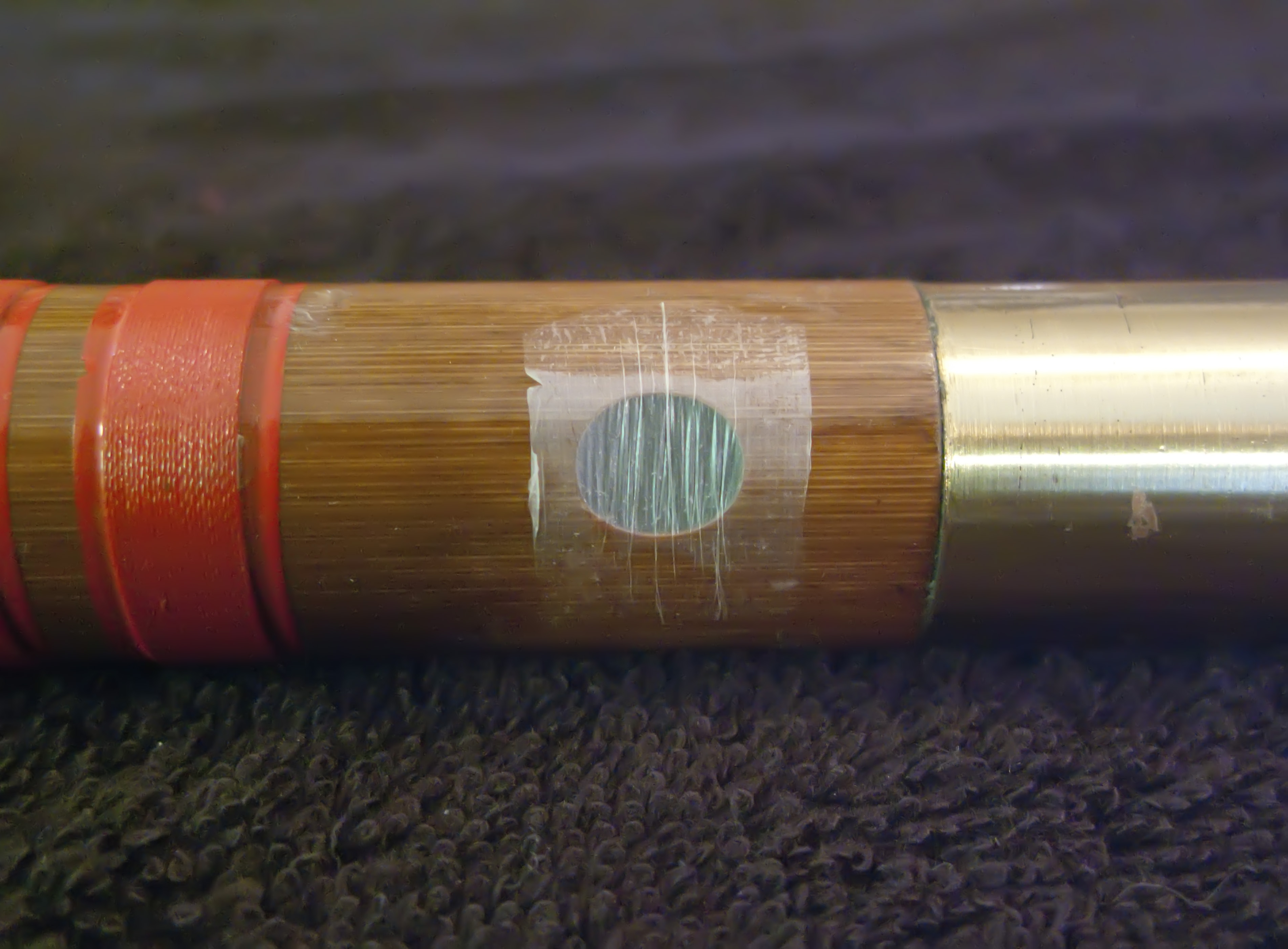 Properly placed [dimo] on a [dizi]